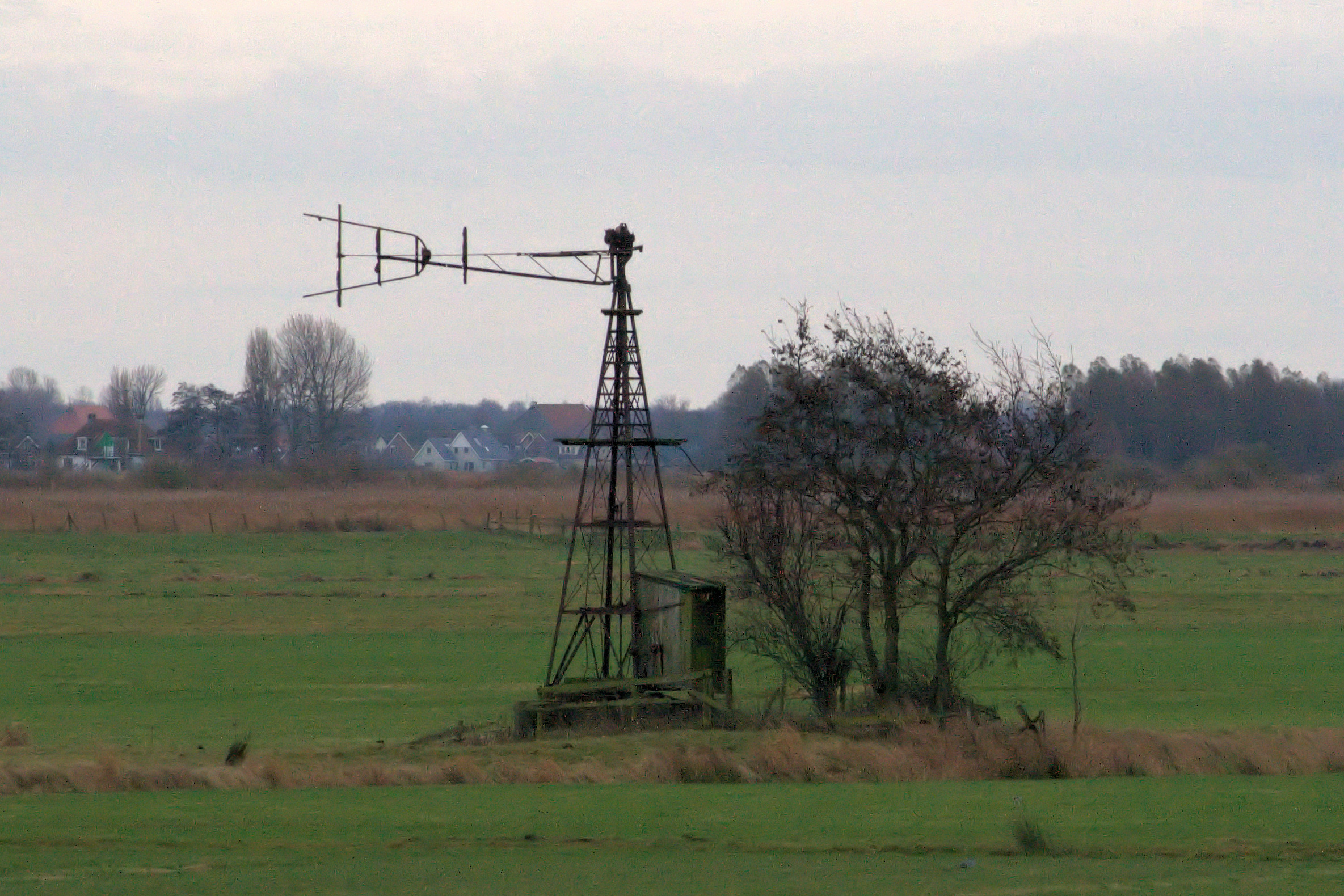 Koudum: Windmotor Koudum 2